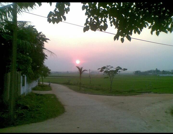 Đập hao đông sơn nới giứ trứ nước, là ngã tư vào làng hồ xóm 3